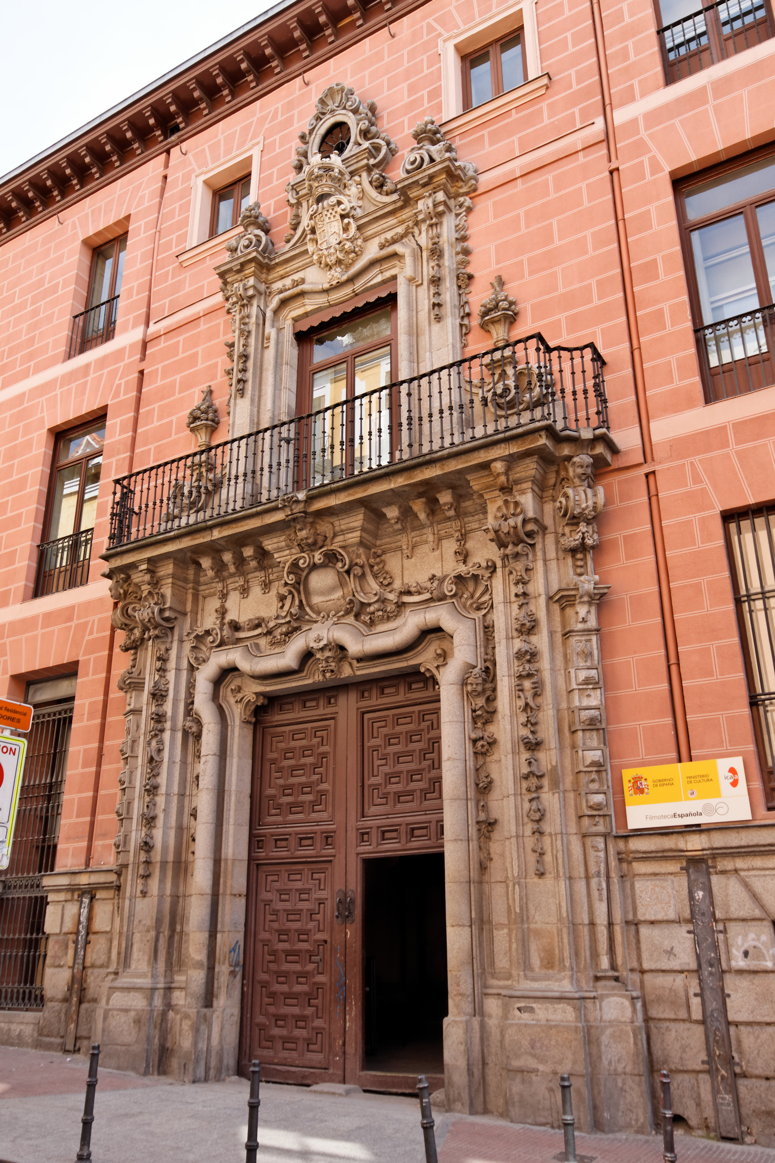 Puerta principal del Palacio del Marqués de Perales. Ubicado en la calle Magdalena Nº 10, Madrid. Este edificio construido entre 1731 y 1732 por Pedro de Ribera es actualmete sede de la Filmoteca Española.